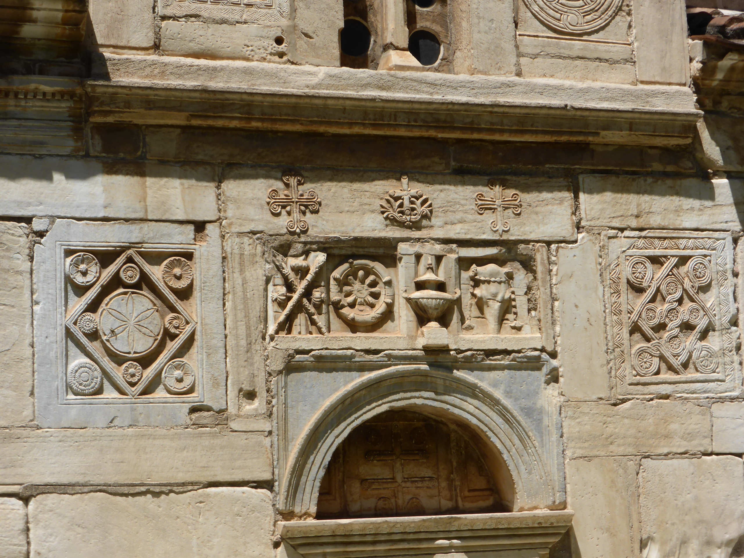 Panagia Gorgoepikoos, Fries über dem Südeingang